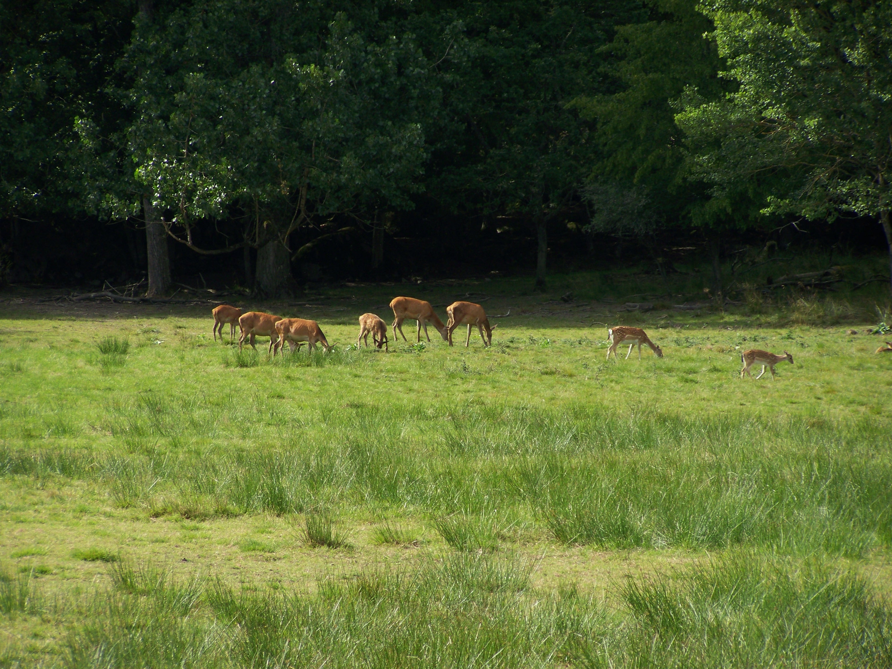 In Schweden. Eriksberg, Blekinge